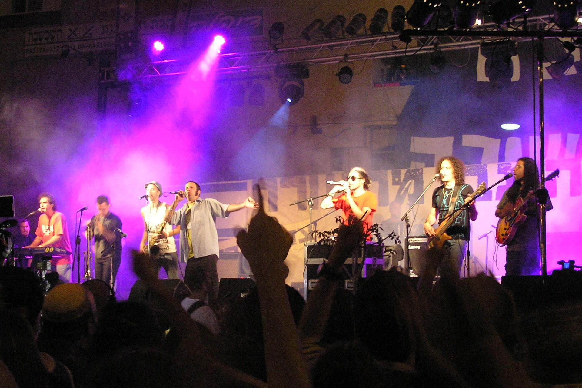 הדג נחש בעצרת "הנגד דורש צדק חברתי" בבאר שבע